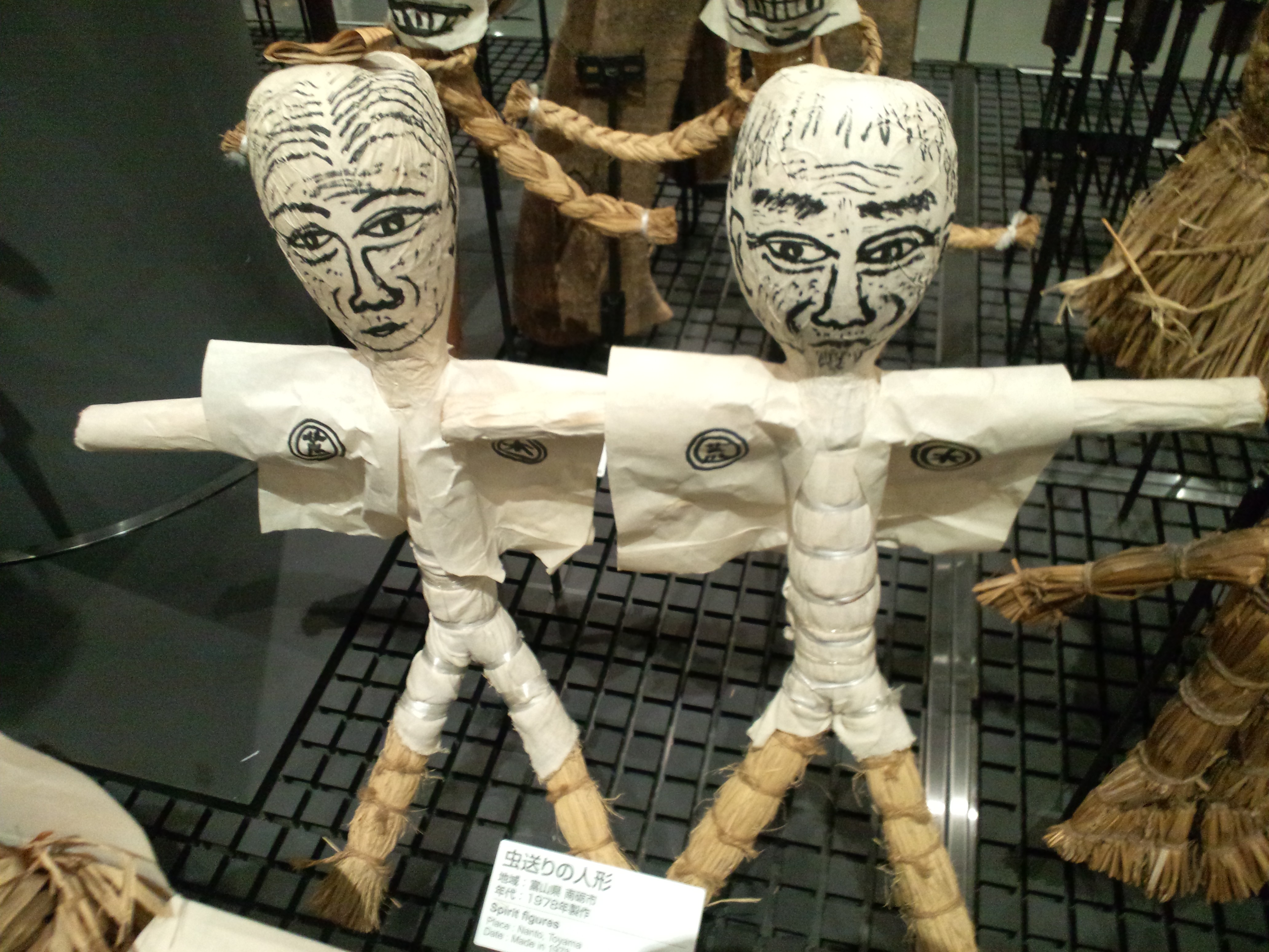 国立民族学博物館（大阪） 虫送りの人形（富山県、南砺市、1978年製作）